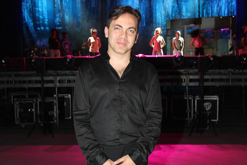 La biografia ha sido editada con contenido ofensivo.